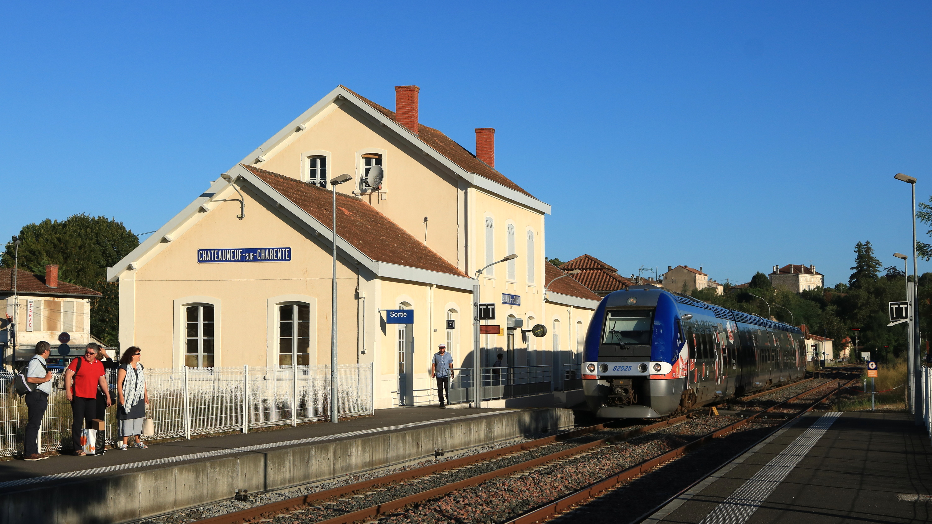 B 82525/6 assurant le TER 864623 (La Rochelle-Ville - Angoulême) arrive en gare de Châteauneuf-sur-Charente.